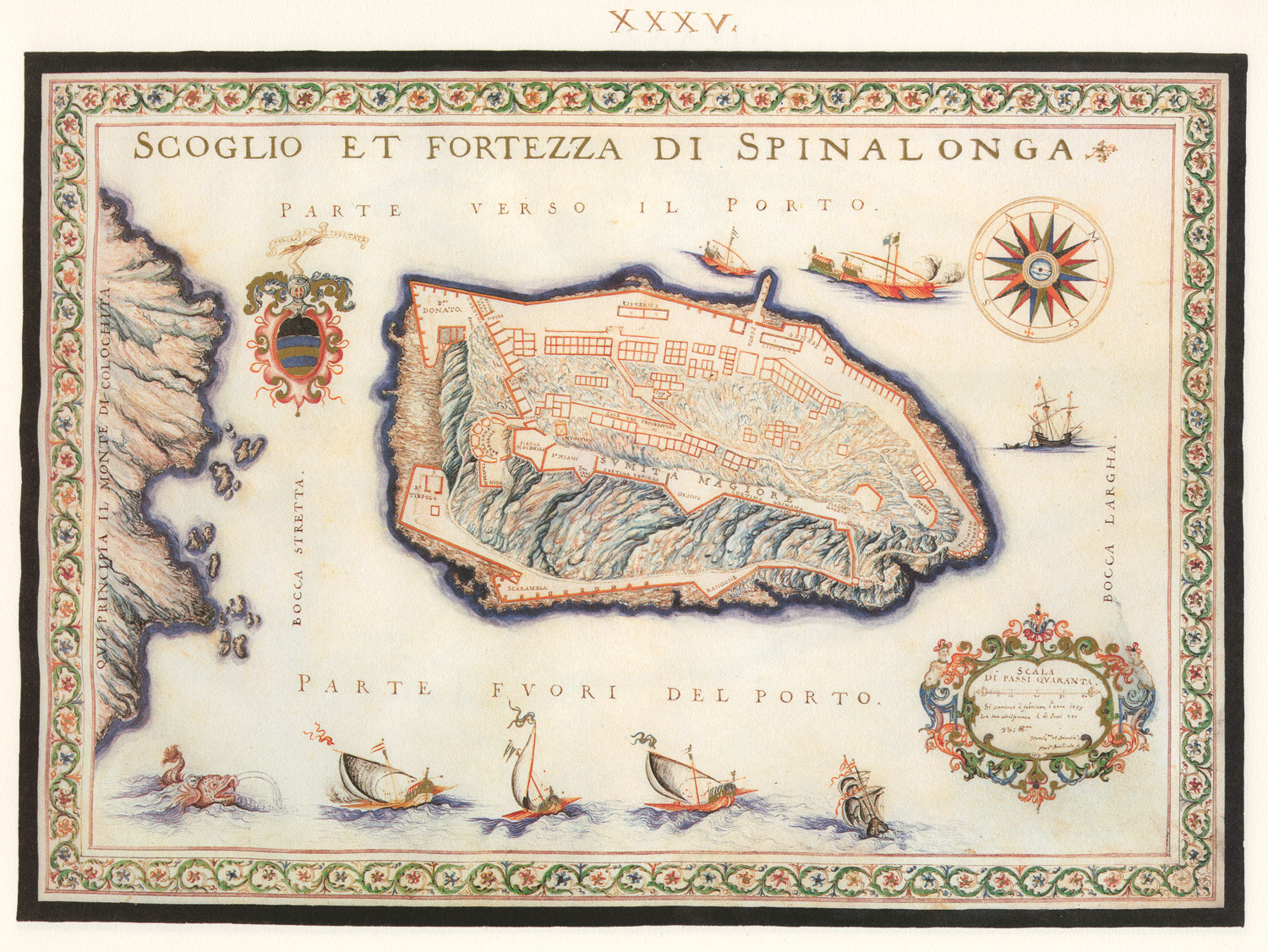 Scoglio, et Fortezza di Spinalonga - Francesco Basilicata - 1618